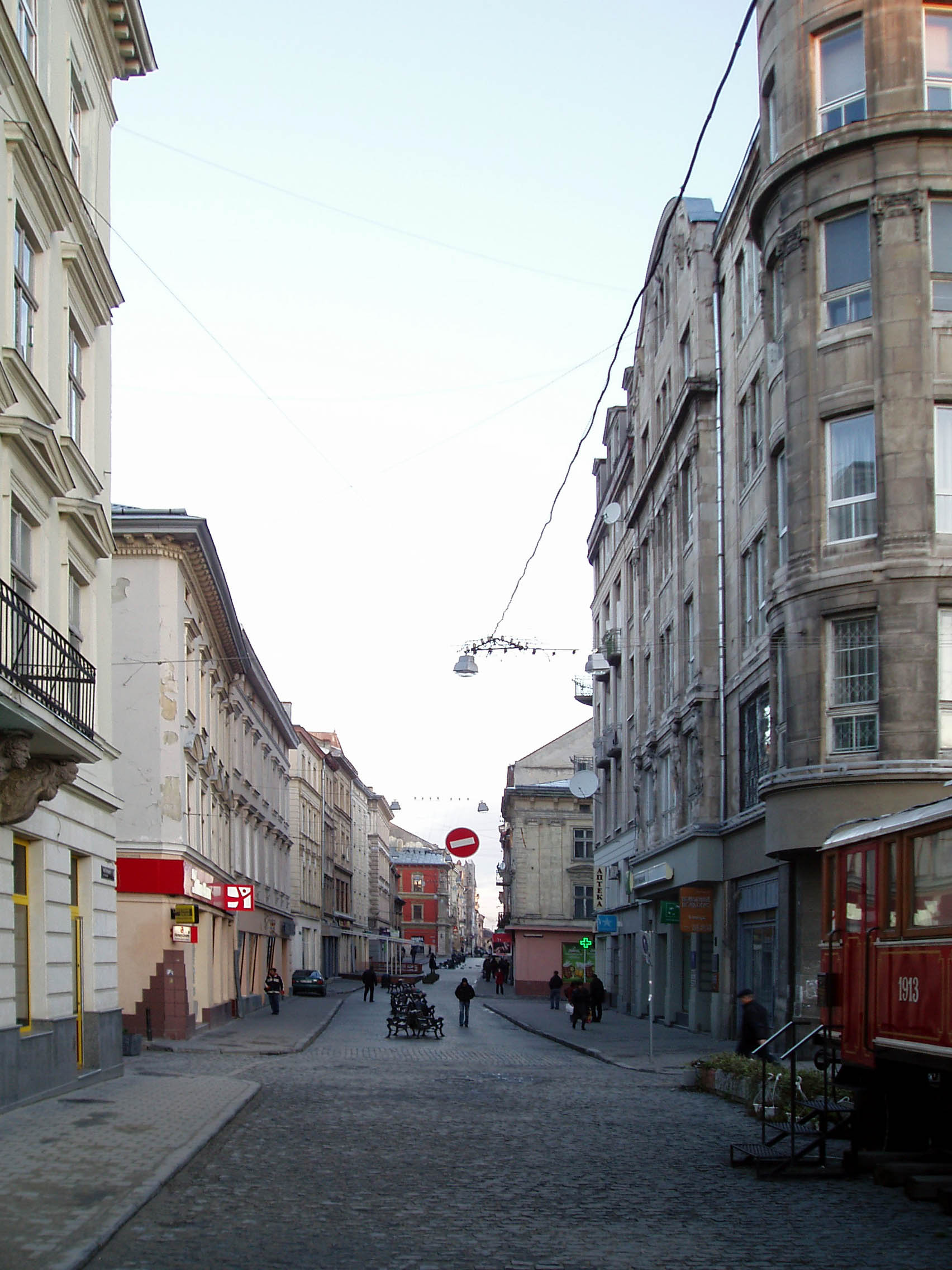 Вулиця Галицька у Львові